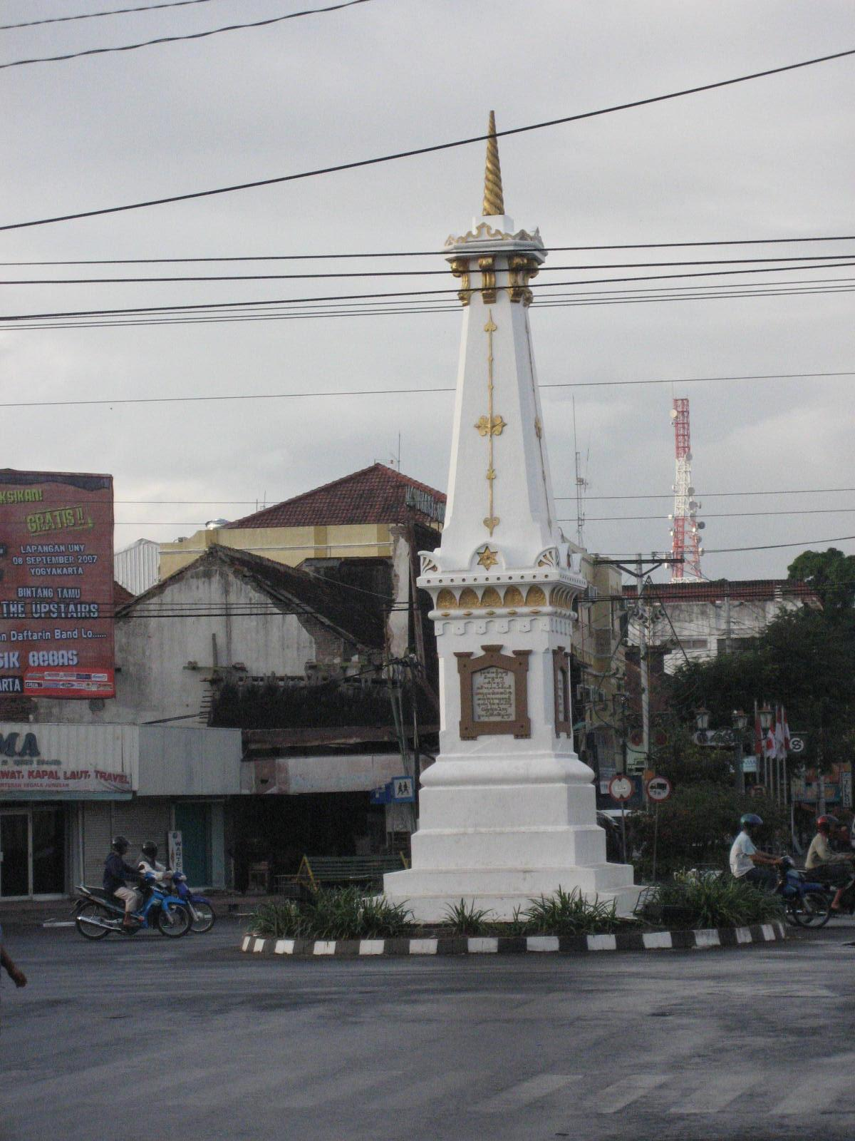 The Tugu monument in Yogyakarta, Java, Indonesia